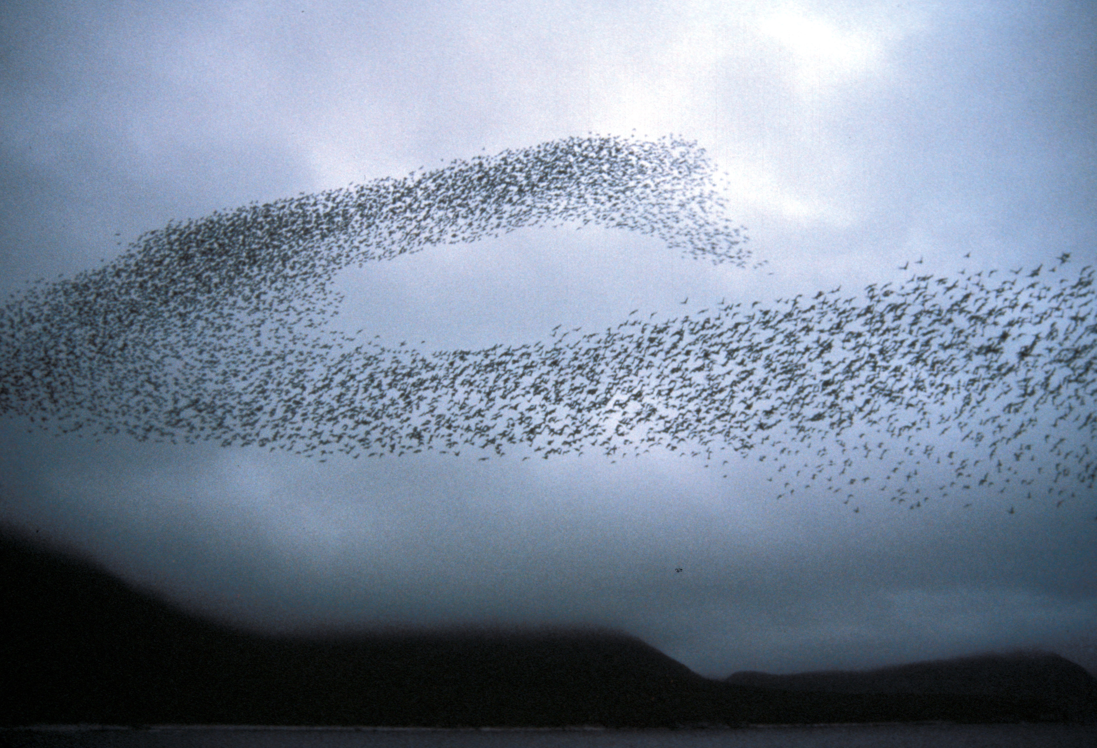 Auklet flock, Shumagins 1986